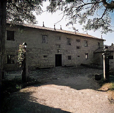 pazo de buzaca en galicia